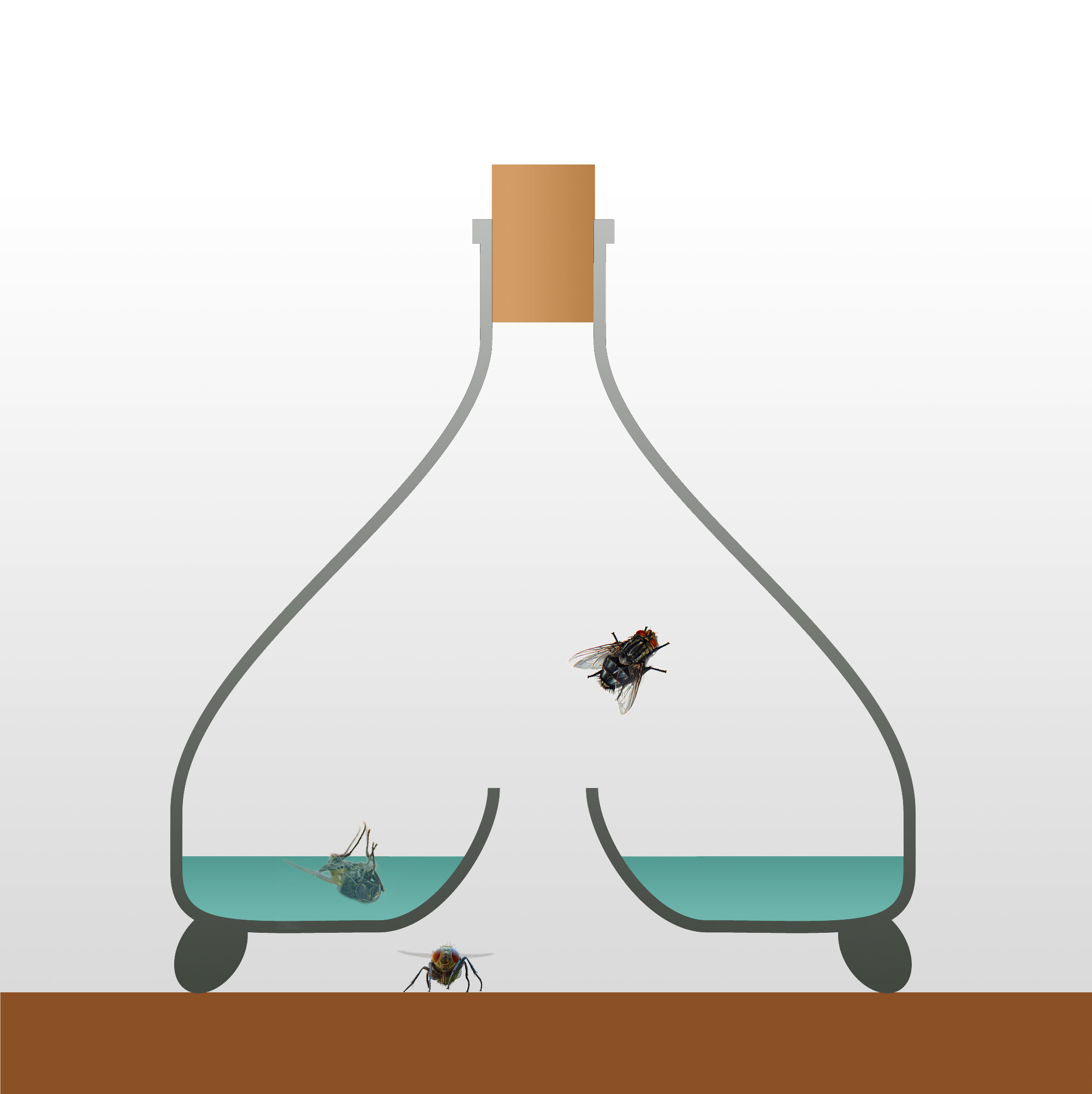 Querschnitt durch ein Fliegenglas